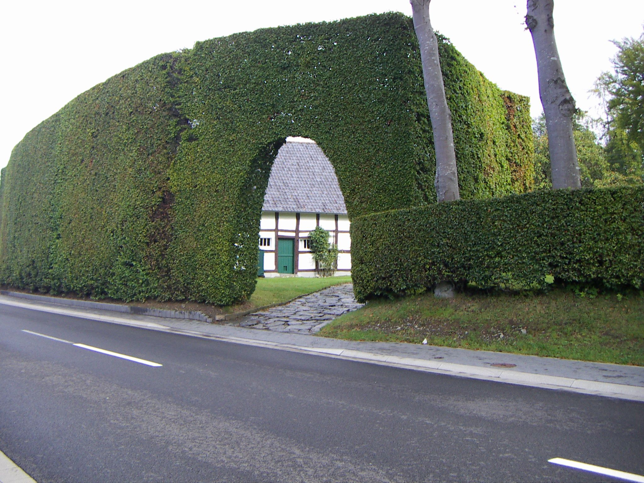 Typisch für den Eifelort Höfen, einem Ortsteil von Monschau sind die haushohen Rotbuchenhecken (Fagus sylvatica)